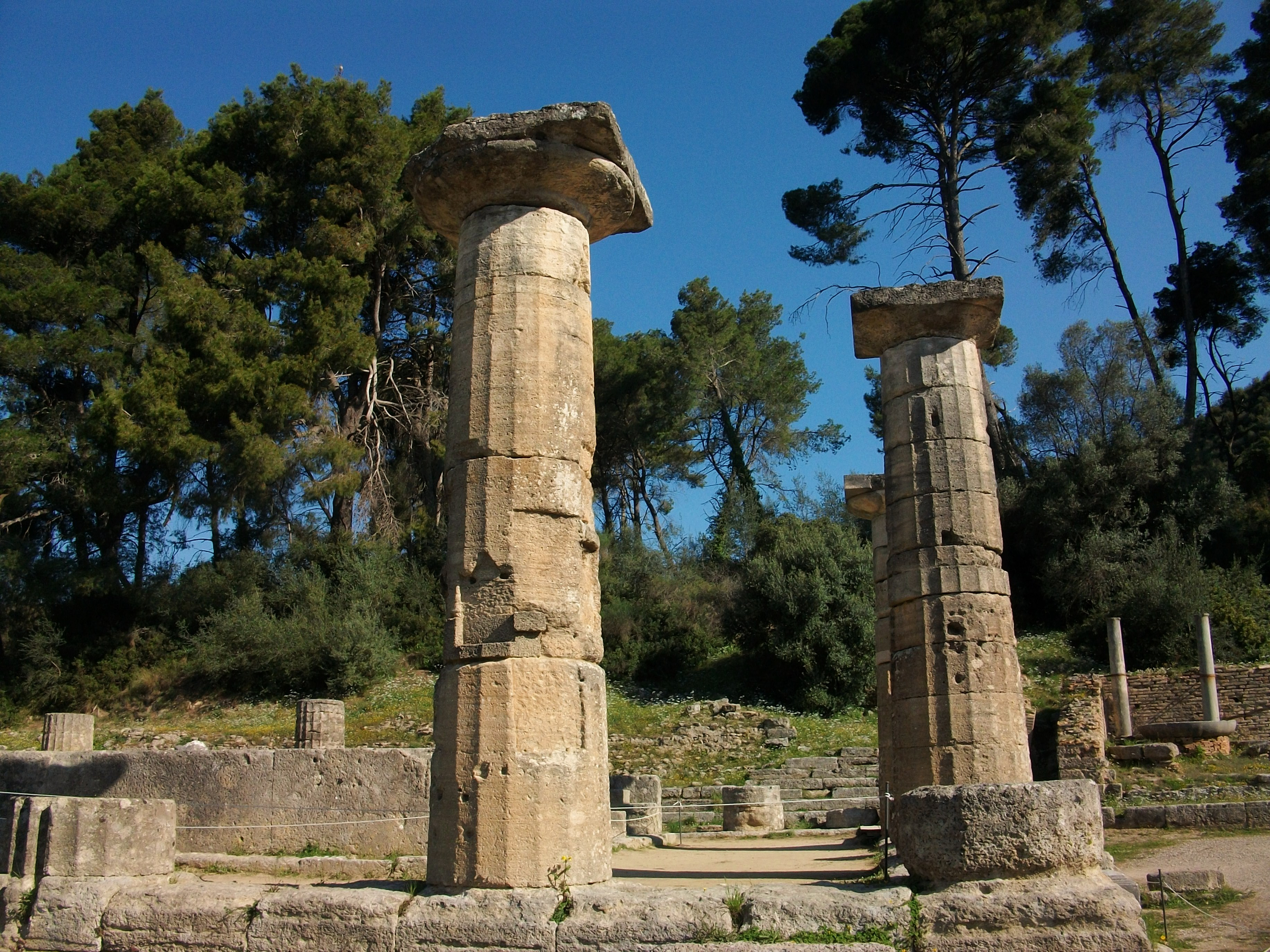 Temple d'Hera d'Olímpia.